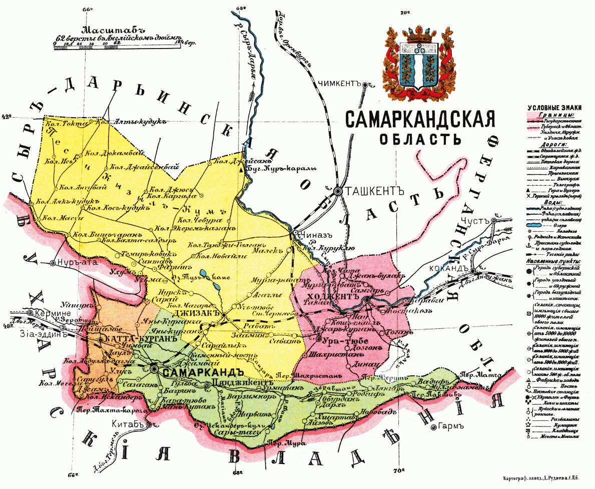 Карта Самаркандской области, 1913